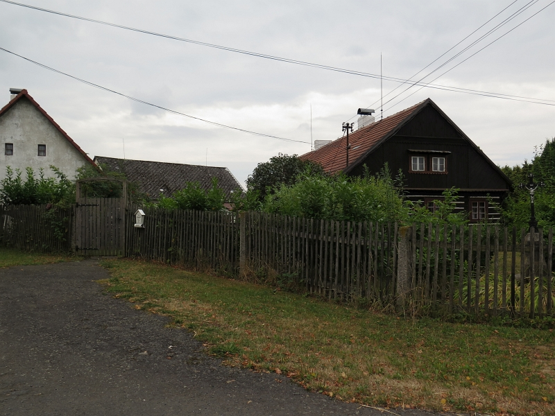 Zemědělský dvůr čp. 1, Hradišťská Lhotka 1, Hradišťská Lhotka.